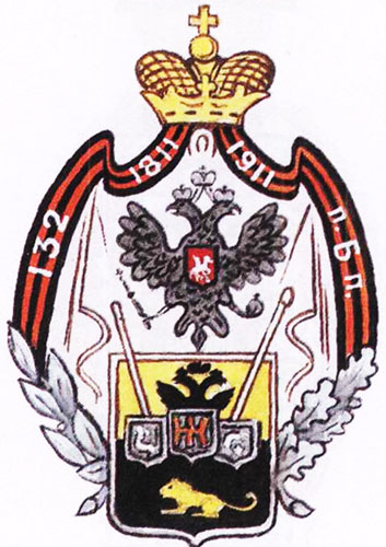 Badge of Bendersky 132-nd Regiment